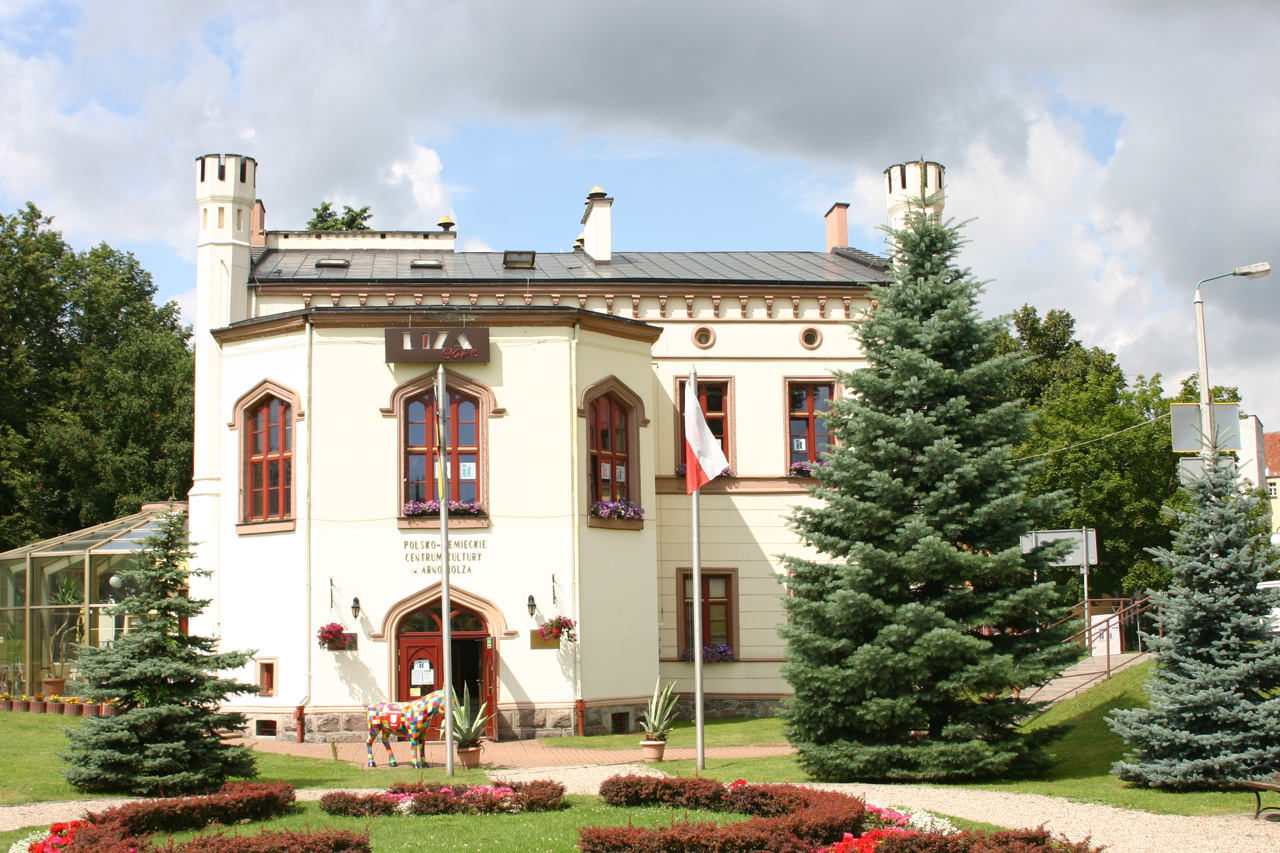 Kętrzyn, Polska